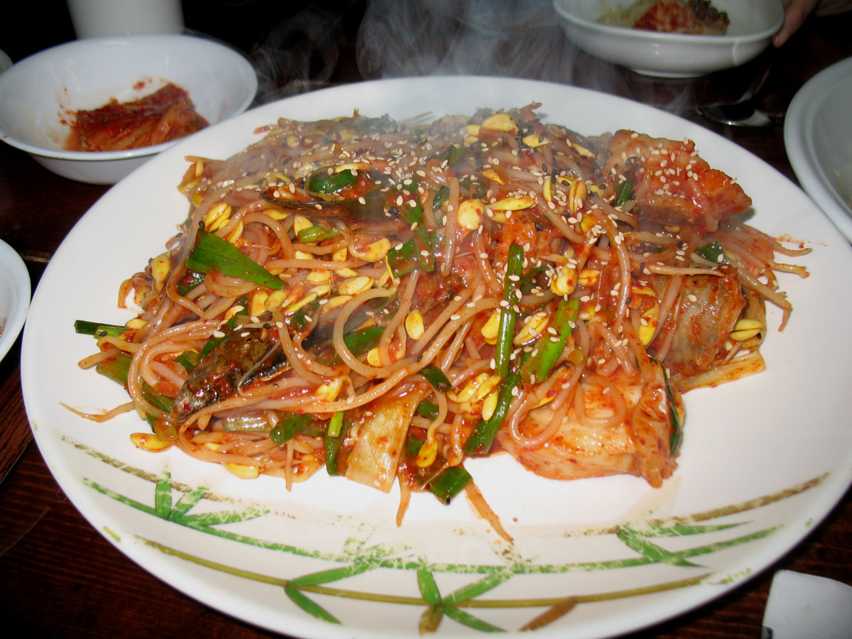 Agujjim